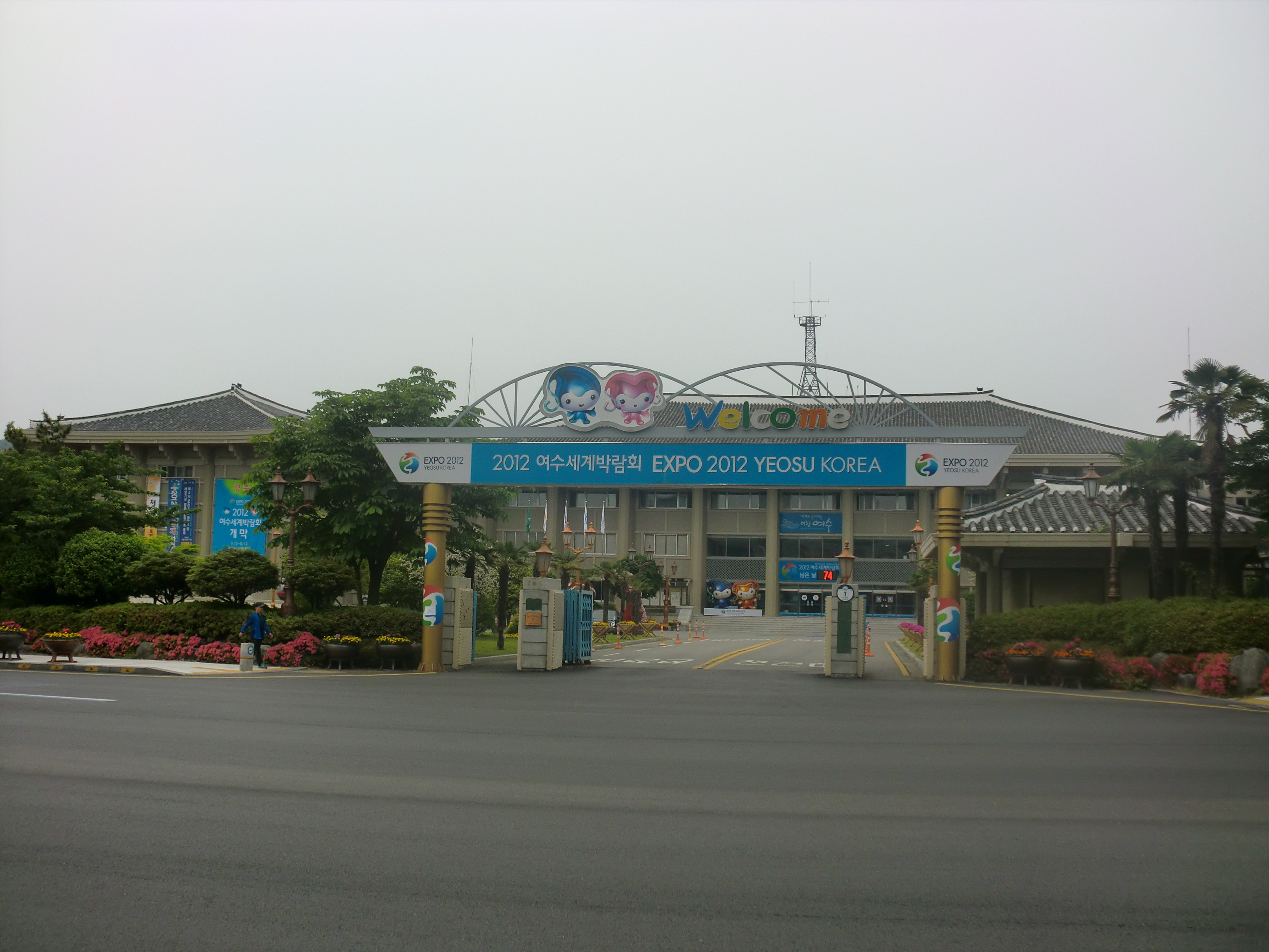 여수시청(구 여천시청)